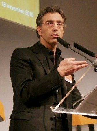 Dominique REYNIÉ, Directeur général de la Fondation pour l’innovation politique. Camera: Canon EOS 30D License on Flickr (2011-01-17): CC-BY-2.0 Flickr tags: classes, moyennes, Dominique Reynié